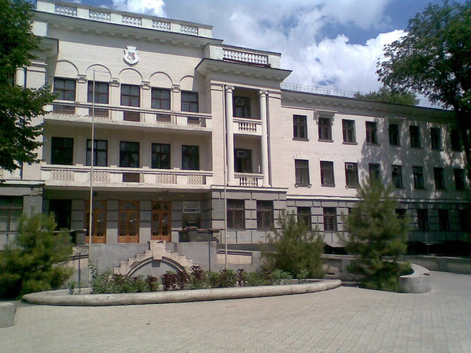 Фото 2го корпуса Запорожского Национального Технического Университета